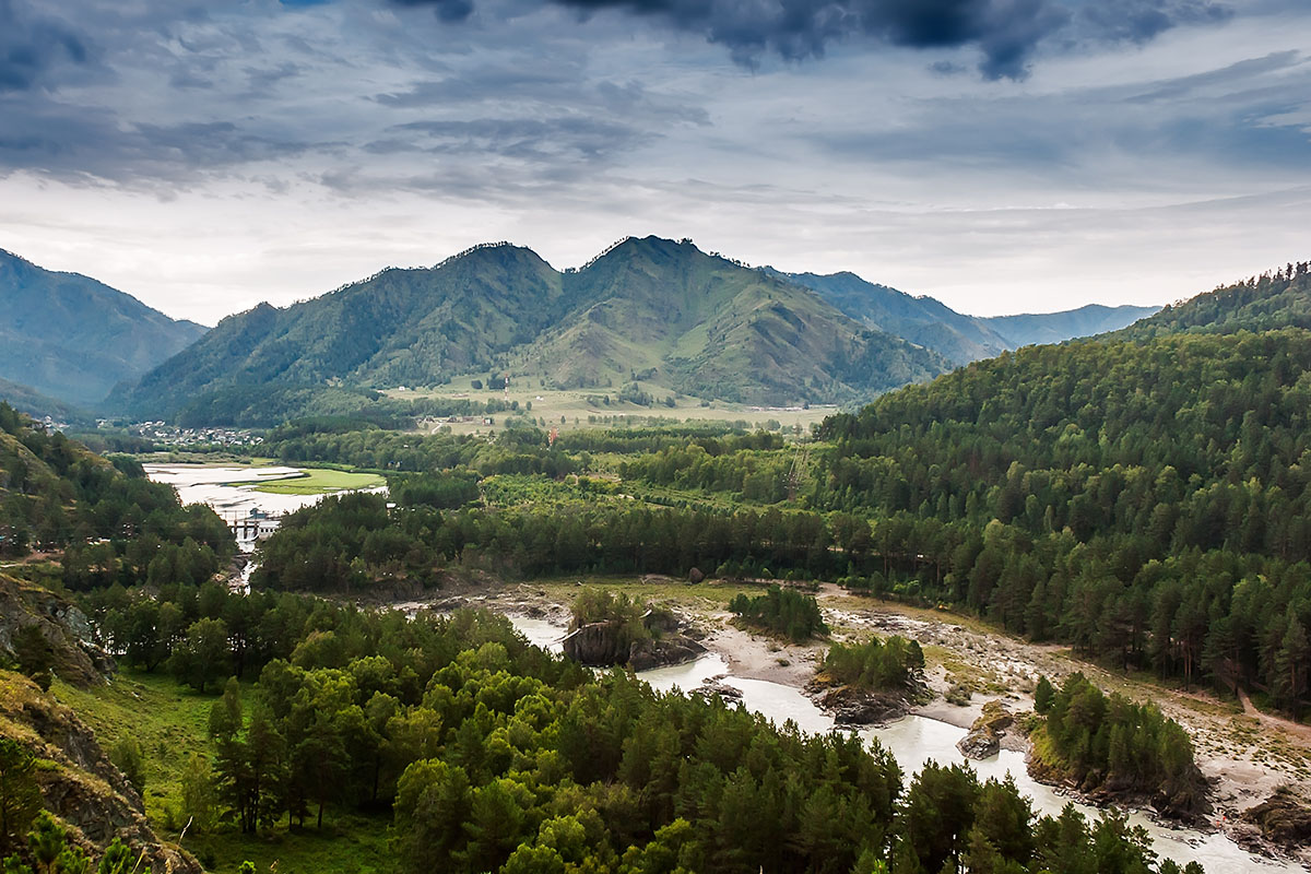 Чемал, Шебалинский район This image is related to the protected area of Russia number 0410057